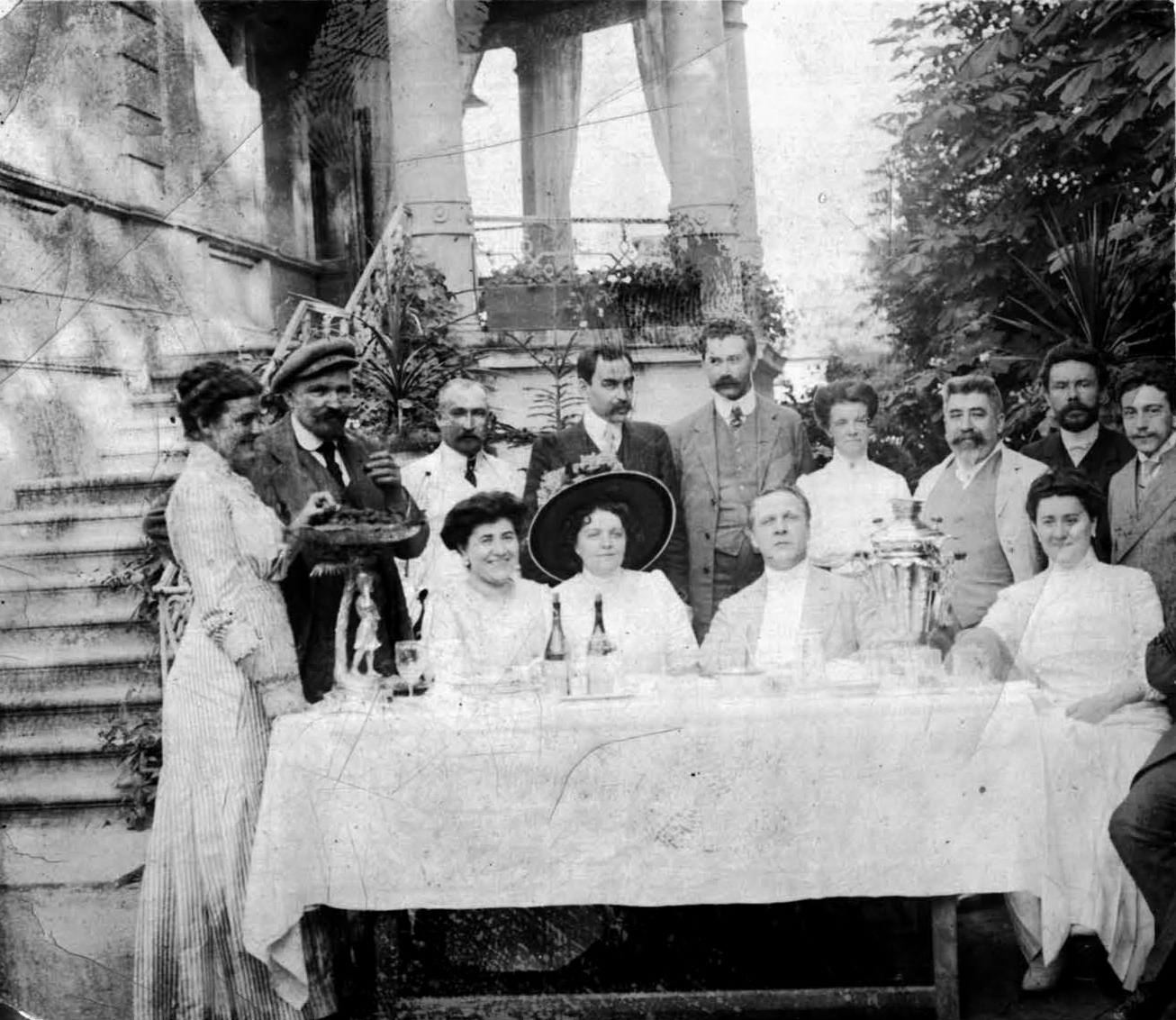 Федір Шаляпін в колі сім'ї Степана Сурукчі та його друзів на подвір'ї будинку Сурукчі (Харків, 1910)Сидятm за столом (зліва направо): М. І. Бржестович (родичка), Т. І. Сурукчі (дружина С. Г. Сурукчі), Ф. І. Шаляпін, В. М. Френкель (дружина лікаря М. А. Френкеля).Стоять (зліва направо): товаришка сім'ї Сурукчі меломанка М. Є. Бураго, родич інженер Ц. В. Бржестович, лікар П. М. Сміттен, лікар М. А. Френкель, присяжний повірений О. Д. Шидловський, мадам Дежарден (гувернантка), лікар С. Г. Сурукчі, лікар Б. В. Мангубі.